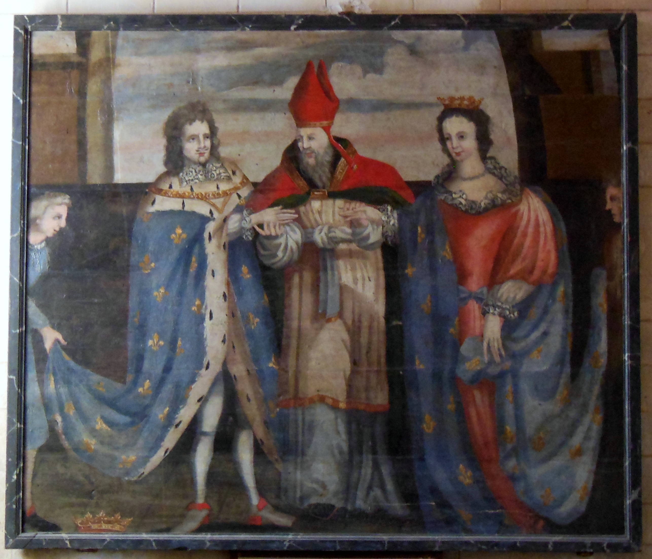 Eglise Saint-Clair de Saillé, tableau représentant les noces du duc Jean IV de Bretagne avec Jeanne de Navarre le 11 septembre 1386